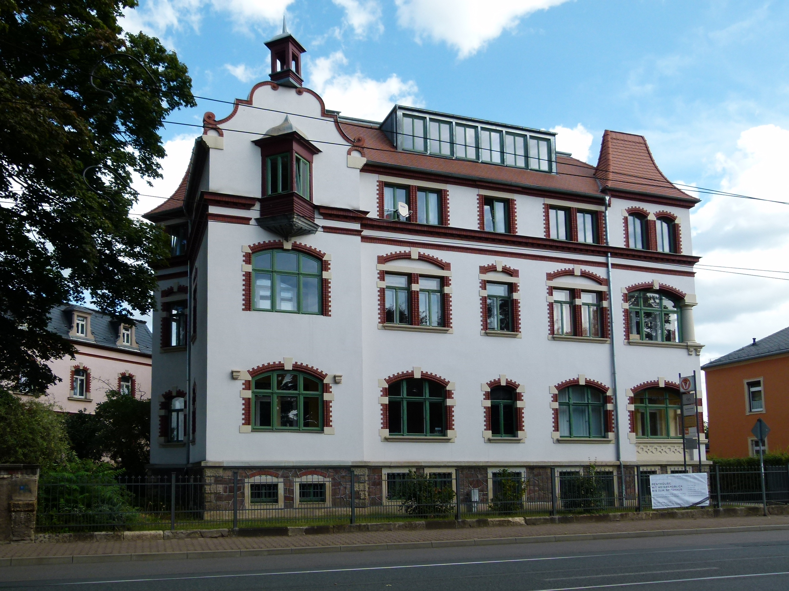 Denkmalgeschütztes Haus, Meißner Straße 96, Radebeul, Sachsen